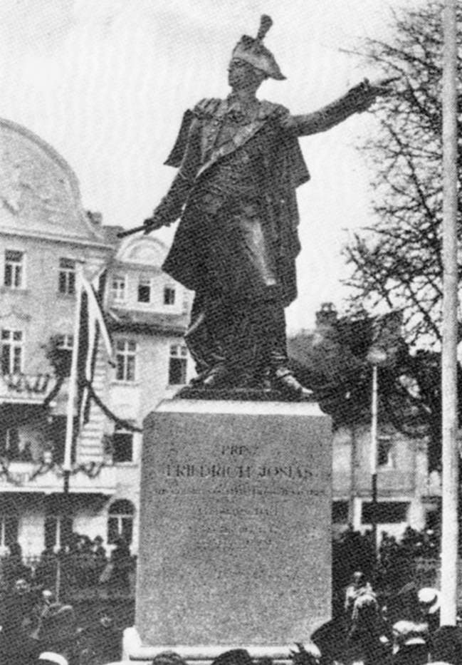 Prinz-Josias-Denkmal in Coburg bei der Enthüllung am 24.11.1911